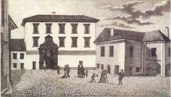 LDK vyriausiojo tribunolo pastatas Vilniuje ir Pilies vartai